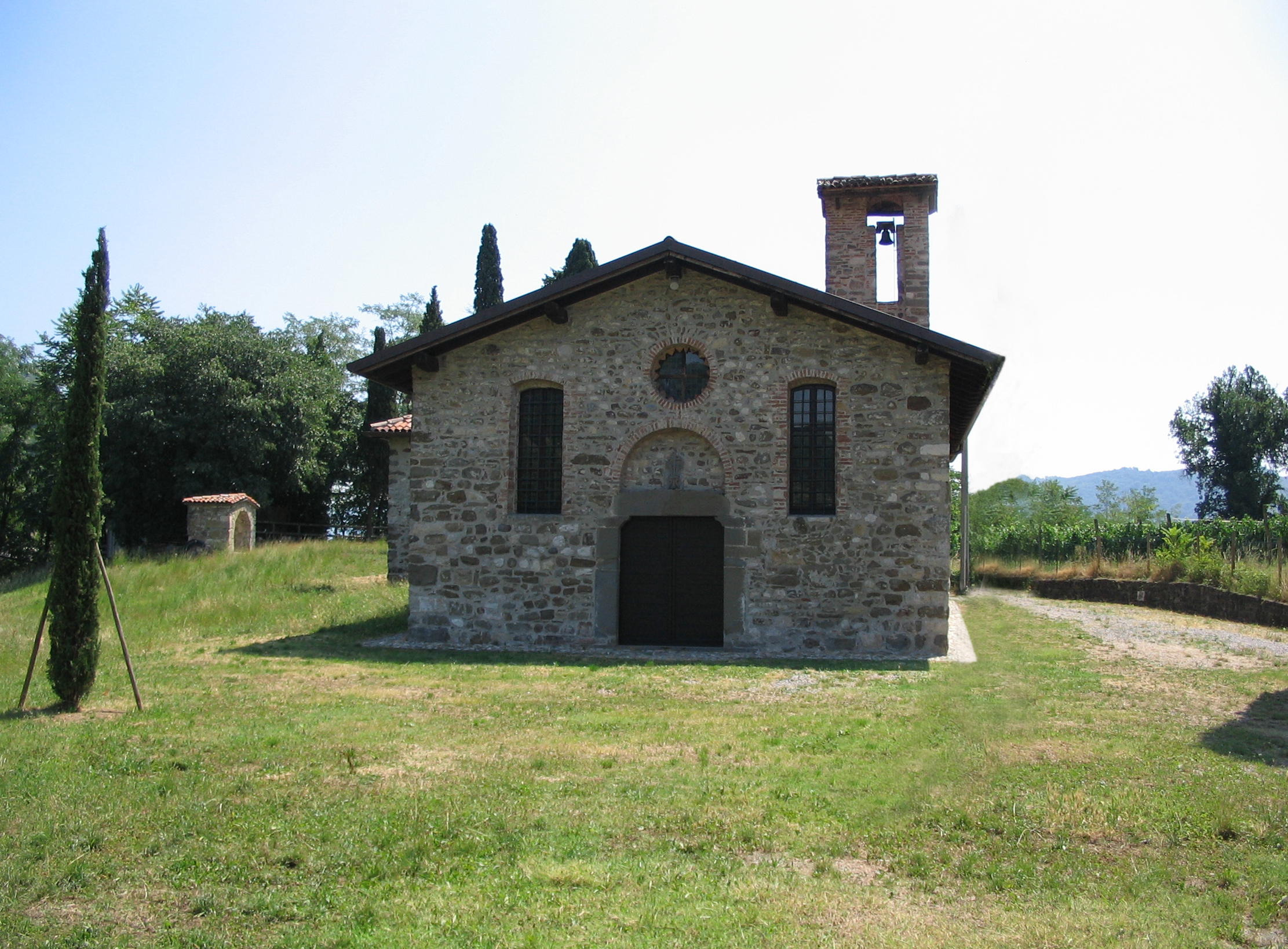 Chiesa di Sant'Alessandro ad Agros, sita nel comune di Villongo.